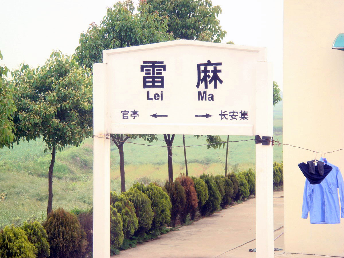 雷麻店站